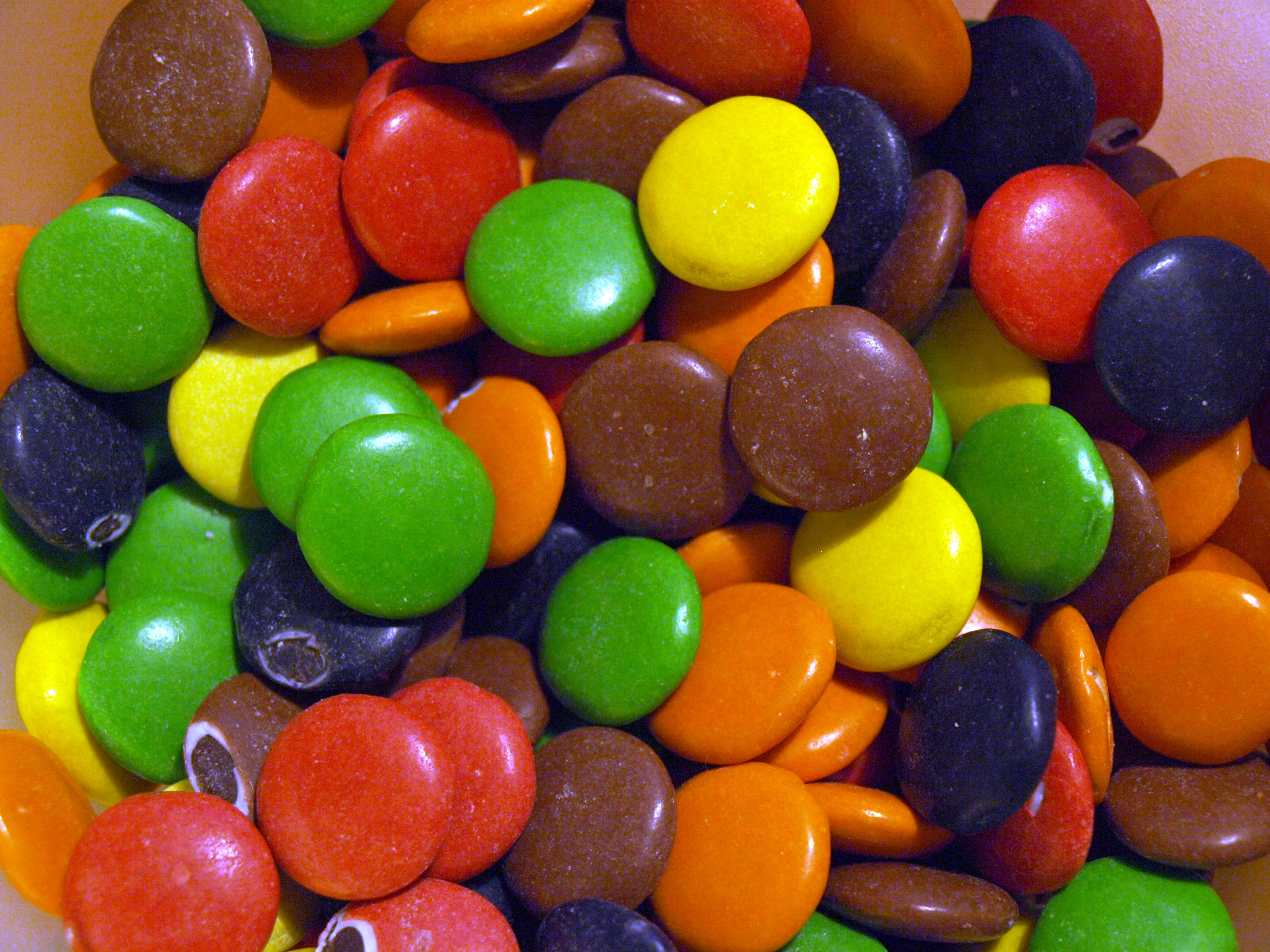 Non Stop, sjokoladelinser fra Freia.